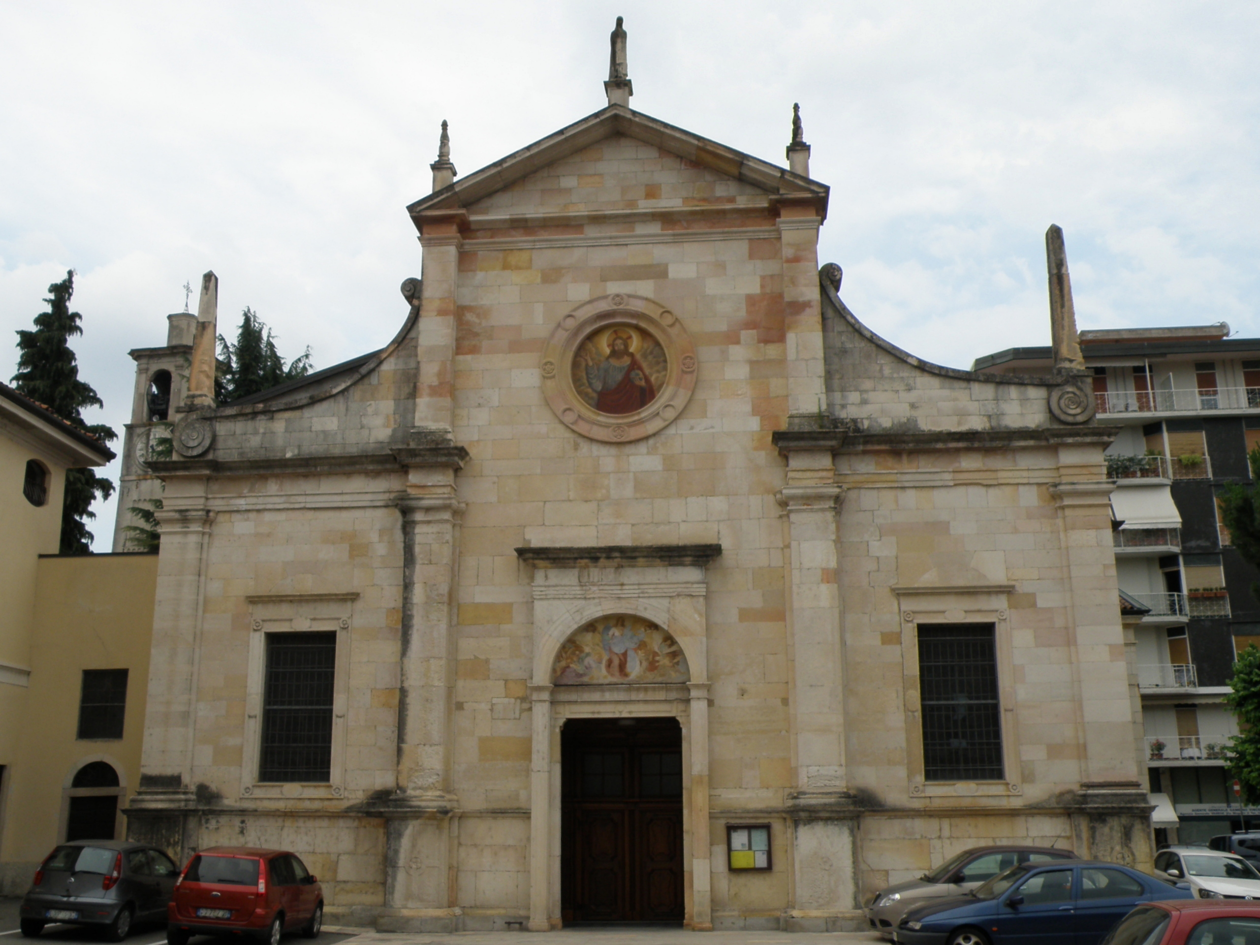 Angera (VA). Chiesa di Santa Maria Assunta. Facciata occidentale.